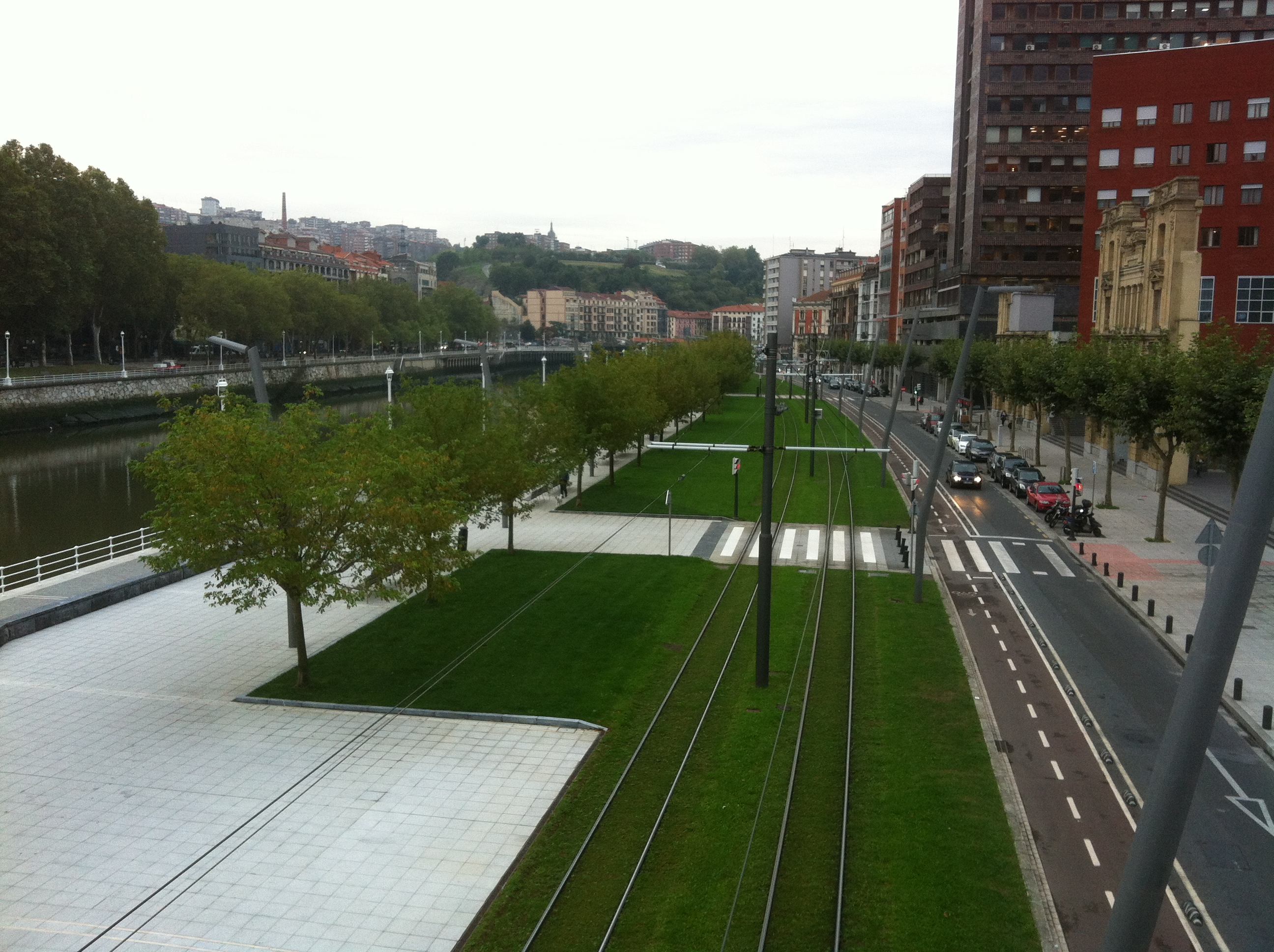 Bilbao Trams - 21